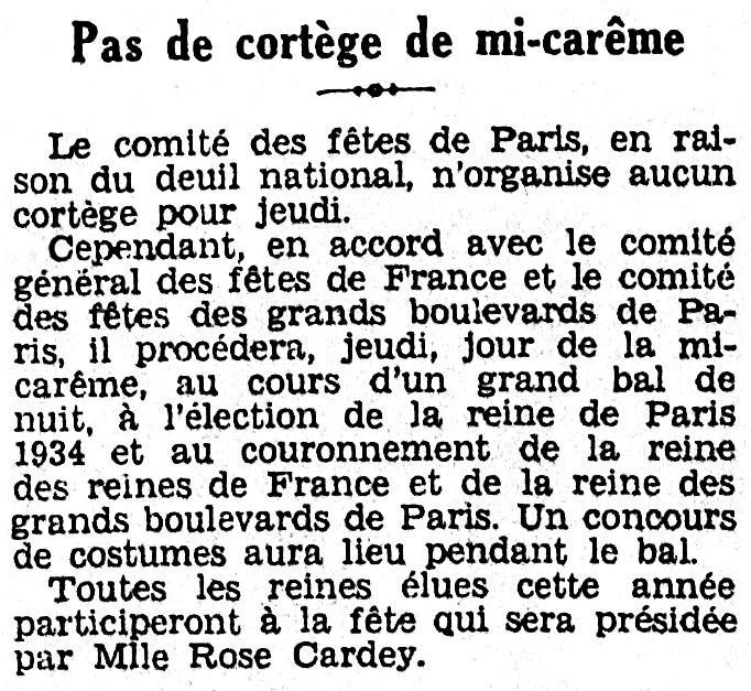 Annulation du cortège de la Mi-Carême 1934 à Paris. Motif invoqué : le deuil national décrété en France à la disparition du roi des Belges.